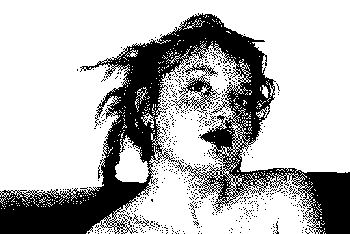 Photographie d'une jeune fille, convertie au format tif et réduite à 512*342 pixels.